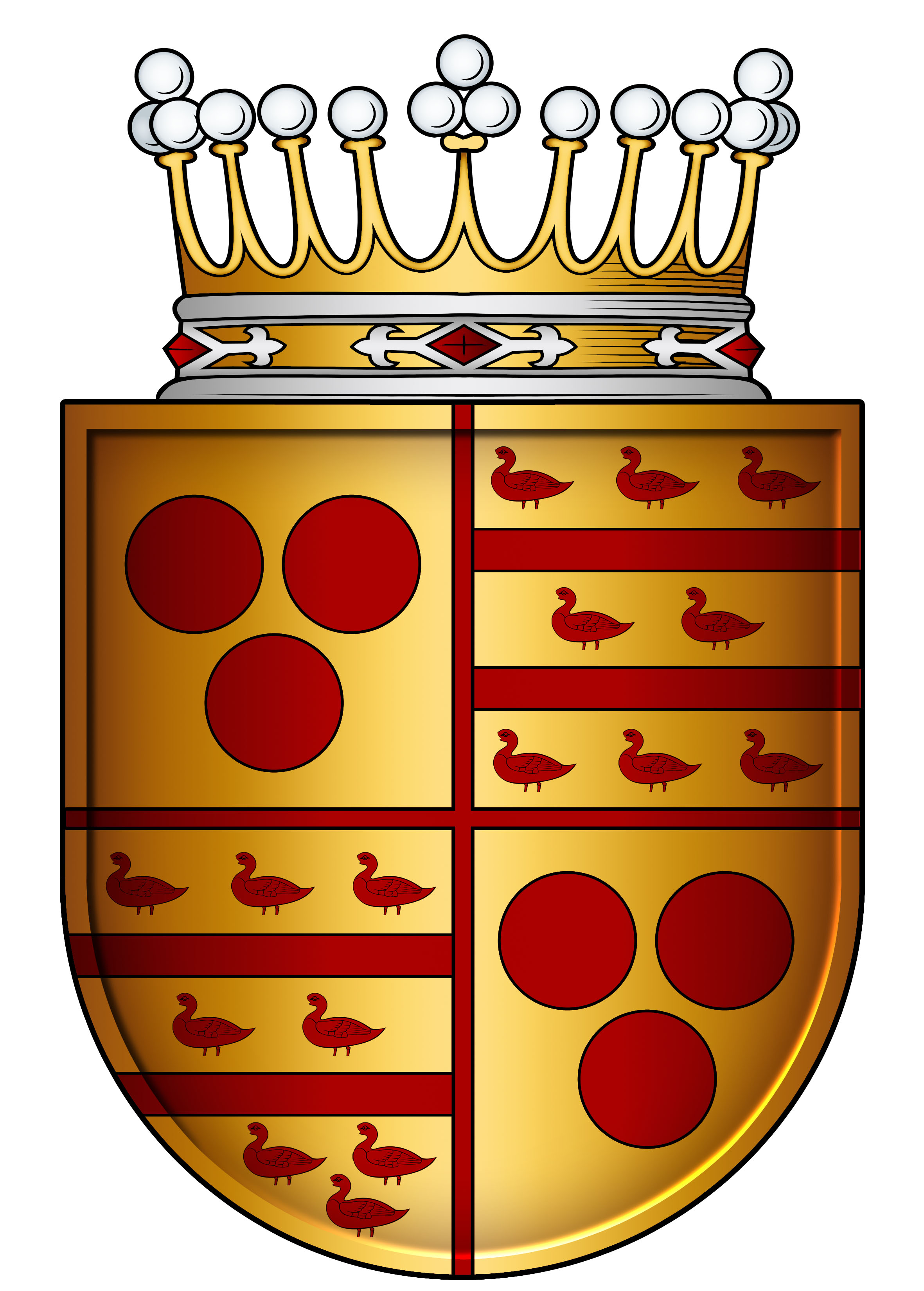 Wapenschild Horst van Cuyck